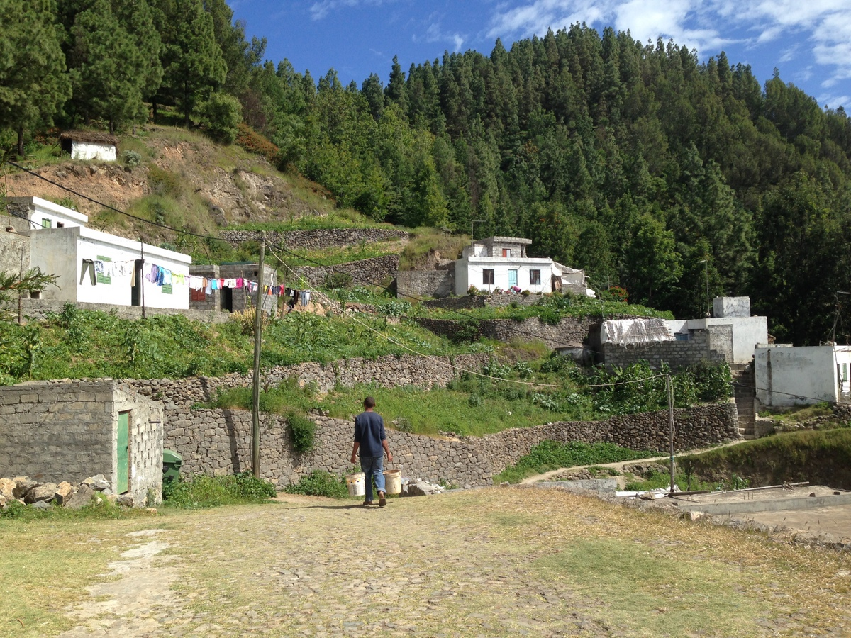 Cabo Verde